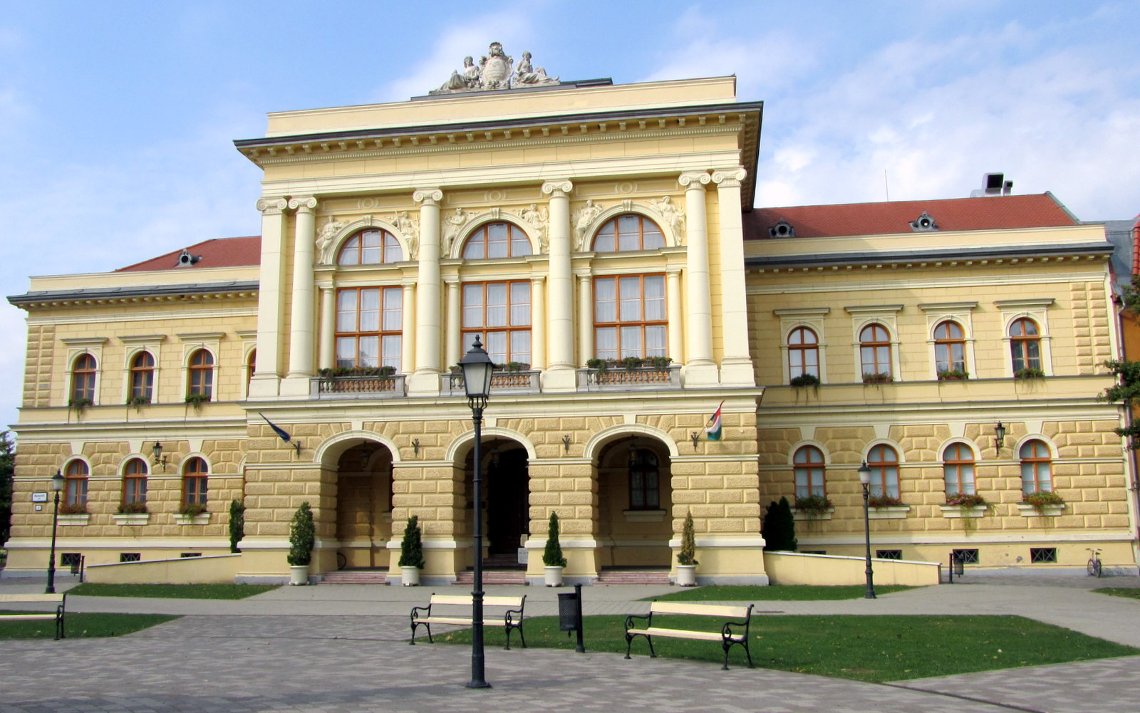 Megyeháza (Szentes, Kossuth tér 1.) This is a photo of a monument in Hungary. Identifier: 3538